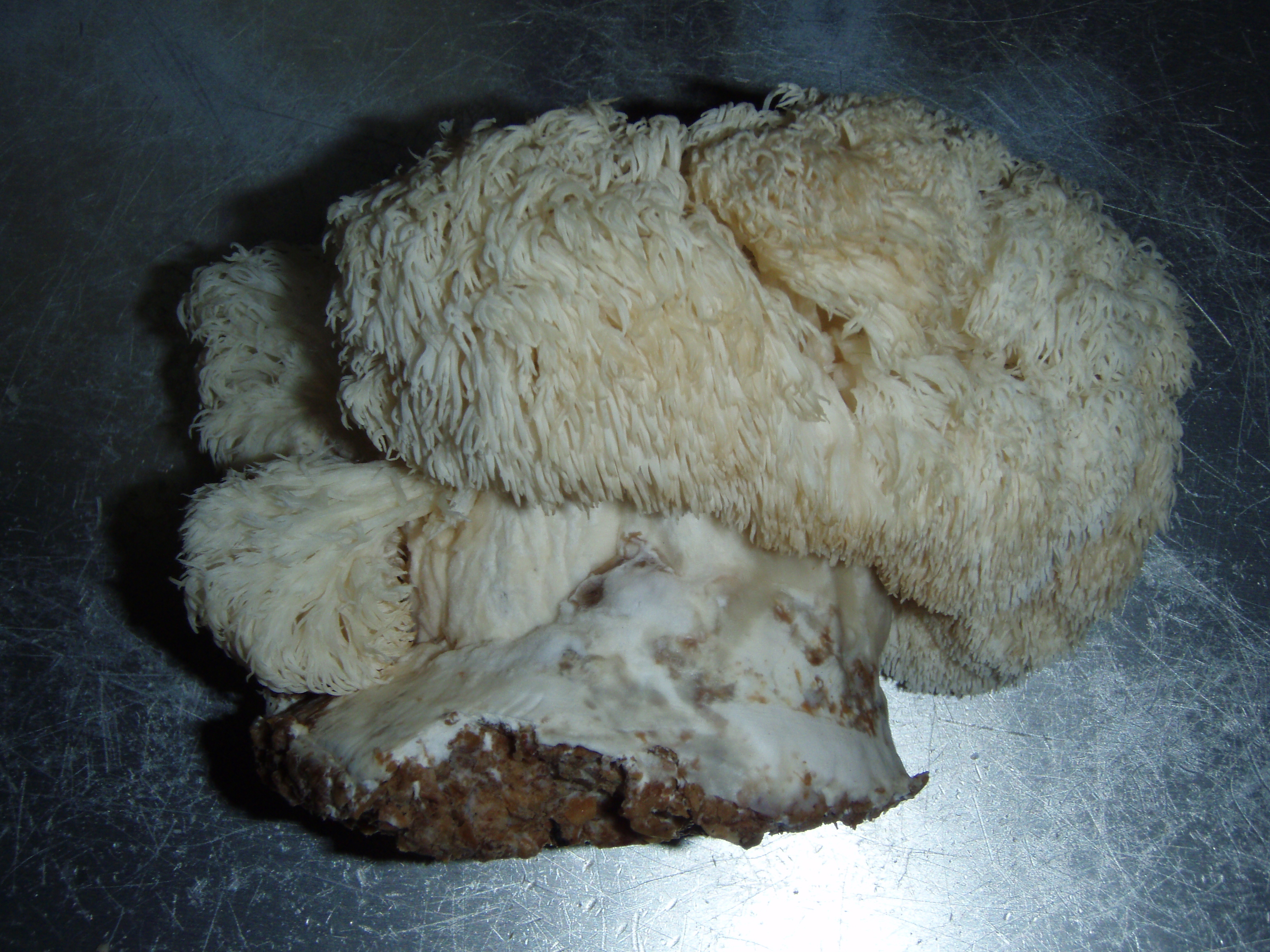 ヤマブシタケの菌床栽培品(Nagano prf. Japan)